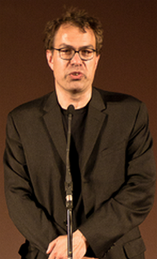 Dominik Moll à une avant-première du film Le Moine au festival Paris Cinéma 2011.